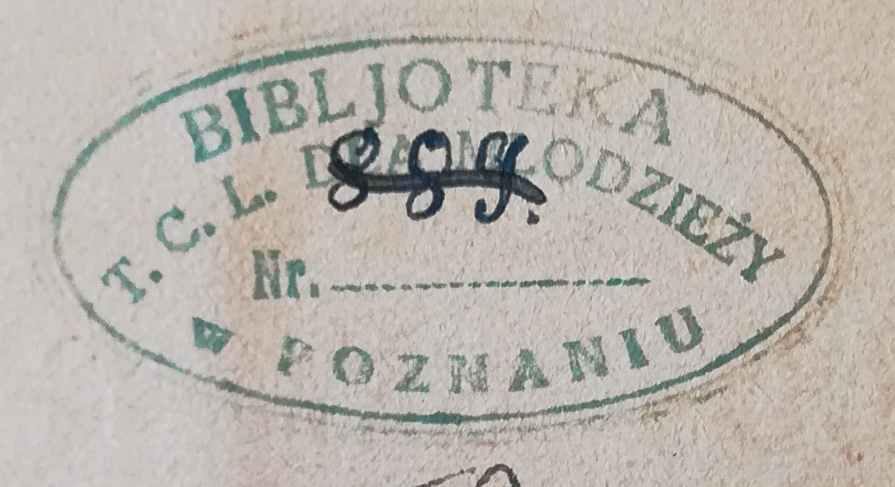 Jerzy Bandrowski, "Pilot św. Teresy" przed 1939 r.